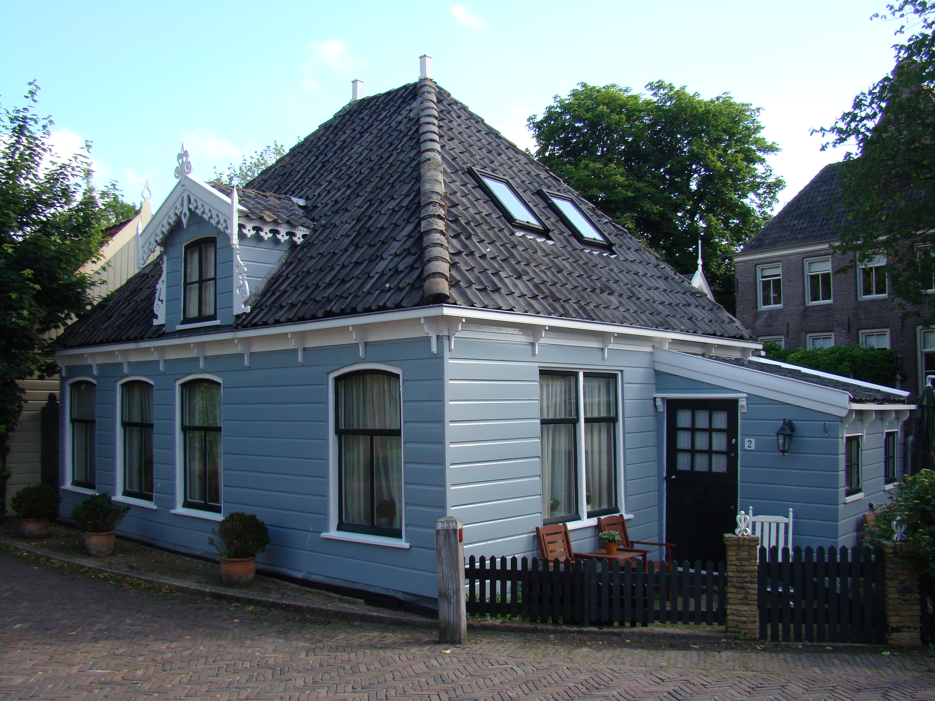 Rijksmonumenten in Broek in Waterland, Netherlands